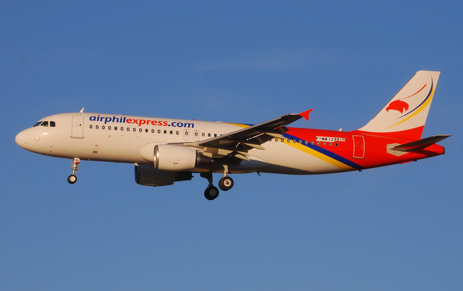 Photo prise à l'aéroport de Toulouse-Blagnac (LFBO) en France. Picture take at Toulouse-Blagnac Airport (LFBO) in France.